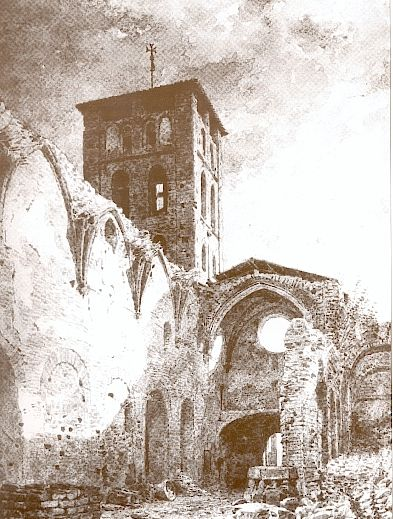 Fanatisme laic i anticatòlic. Ripoll 1835.